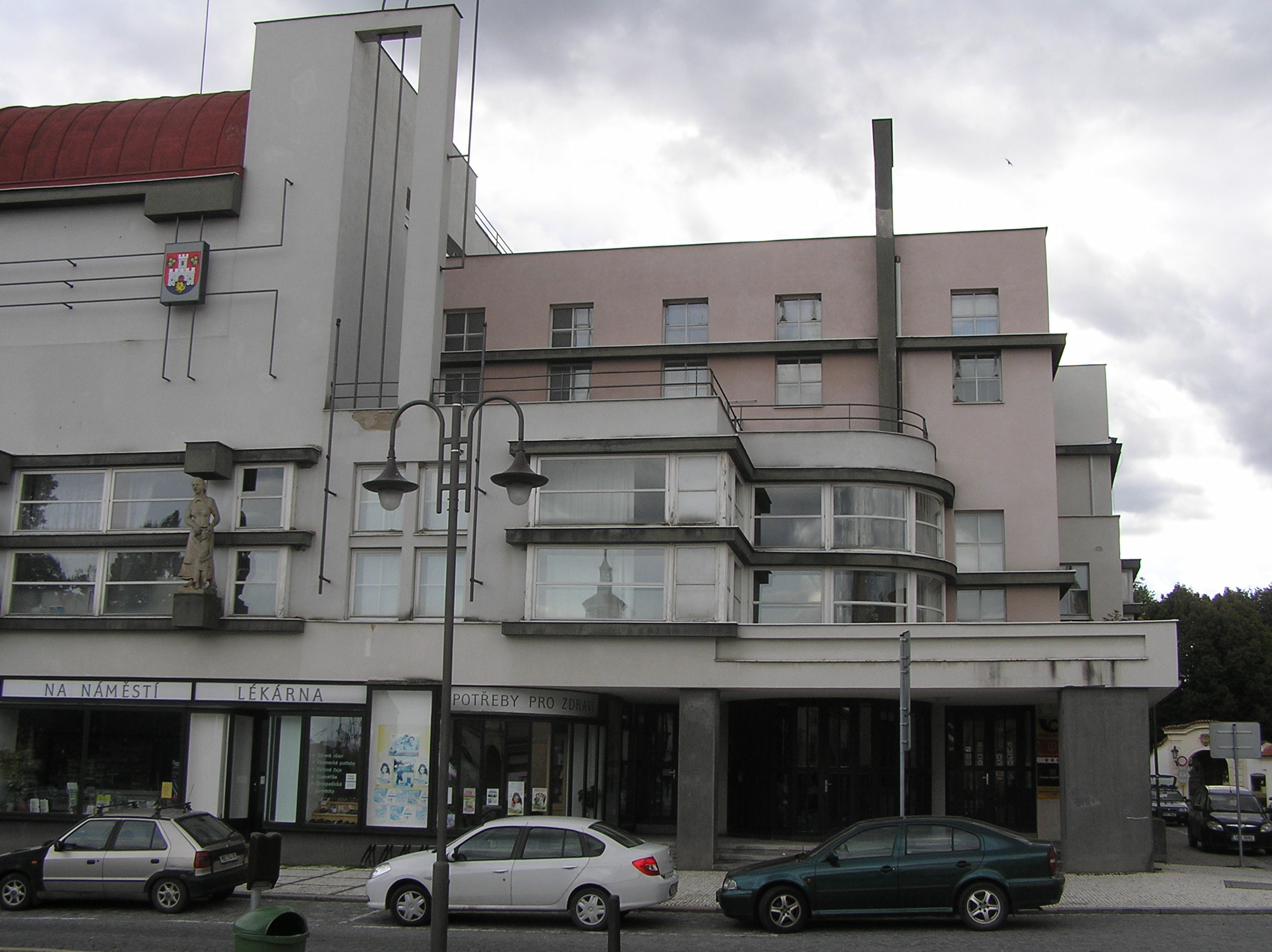 Jiří Kroha: Benátky nad Jizerou, Obecní dům